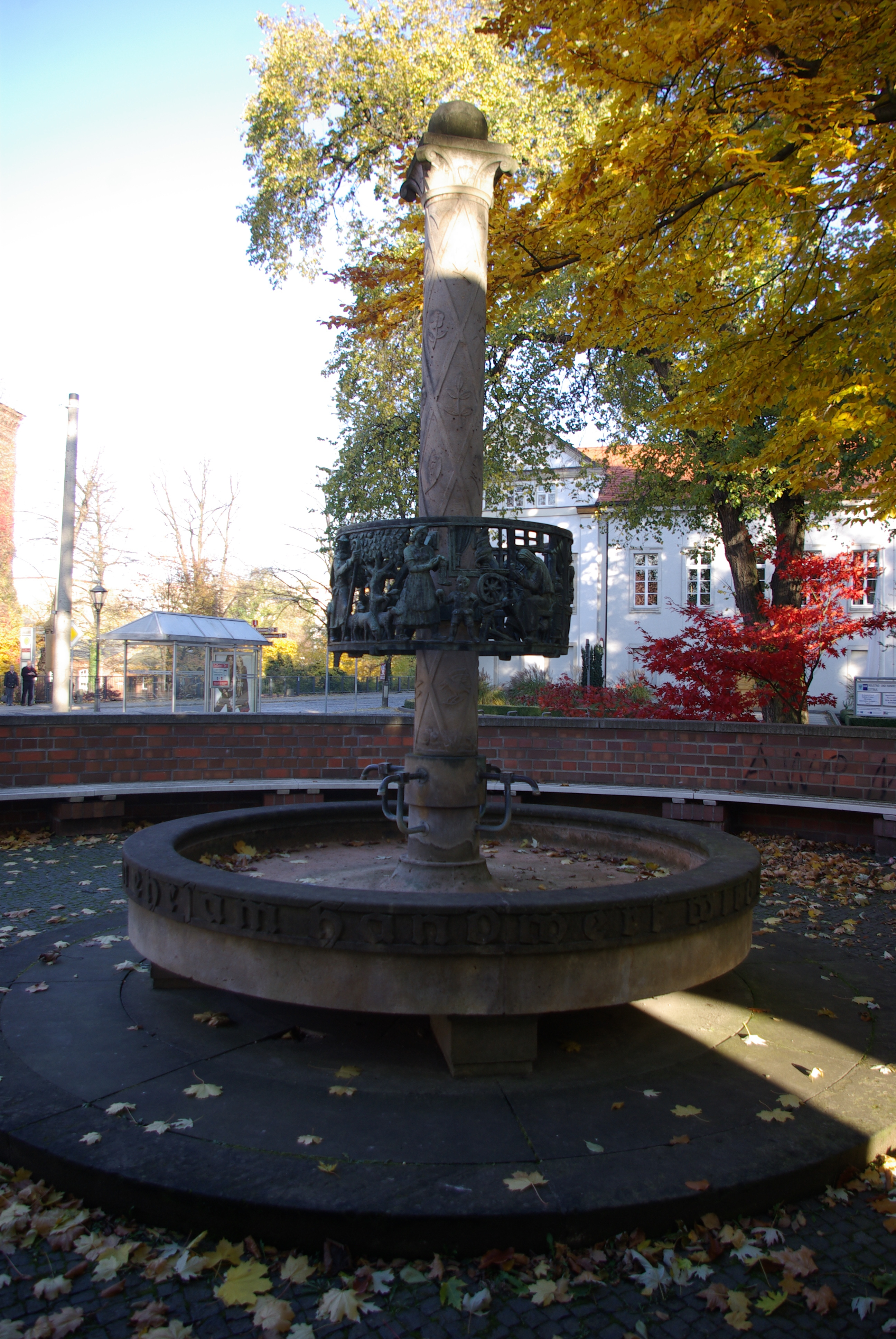 Cottbus in Brandenburg. Der Tuchmacherbrunnen steht an der Sandower Straße. Der Brunnen ist denkmalgeschützt.